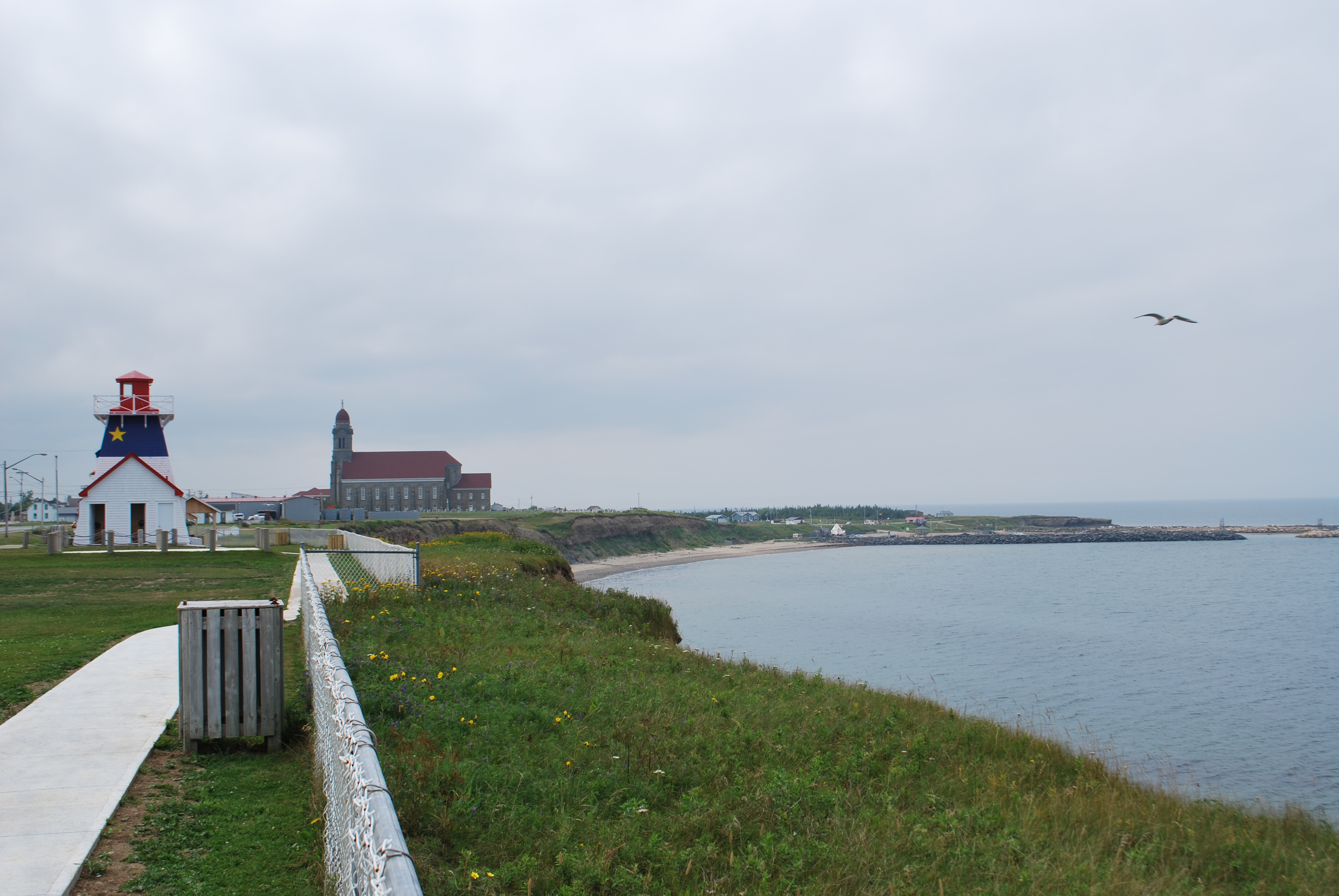 Nord Nouveau-Brunswick.